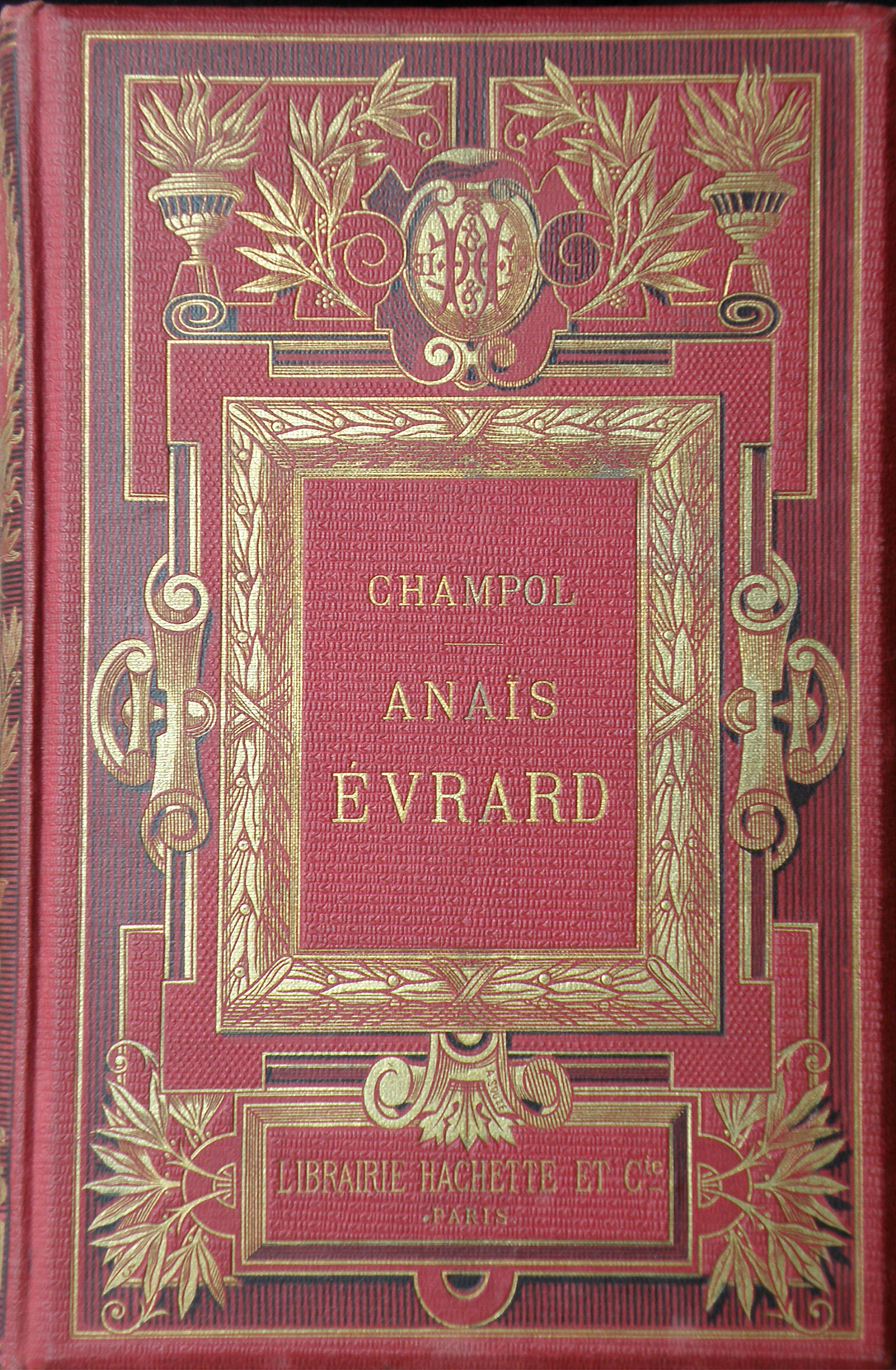 Couverture de l'édition princeps du receuil de nouvelles Anaïs Évrard de Champol, éd. Hachette 1895.